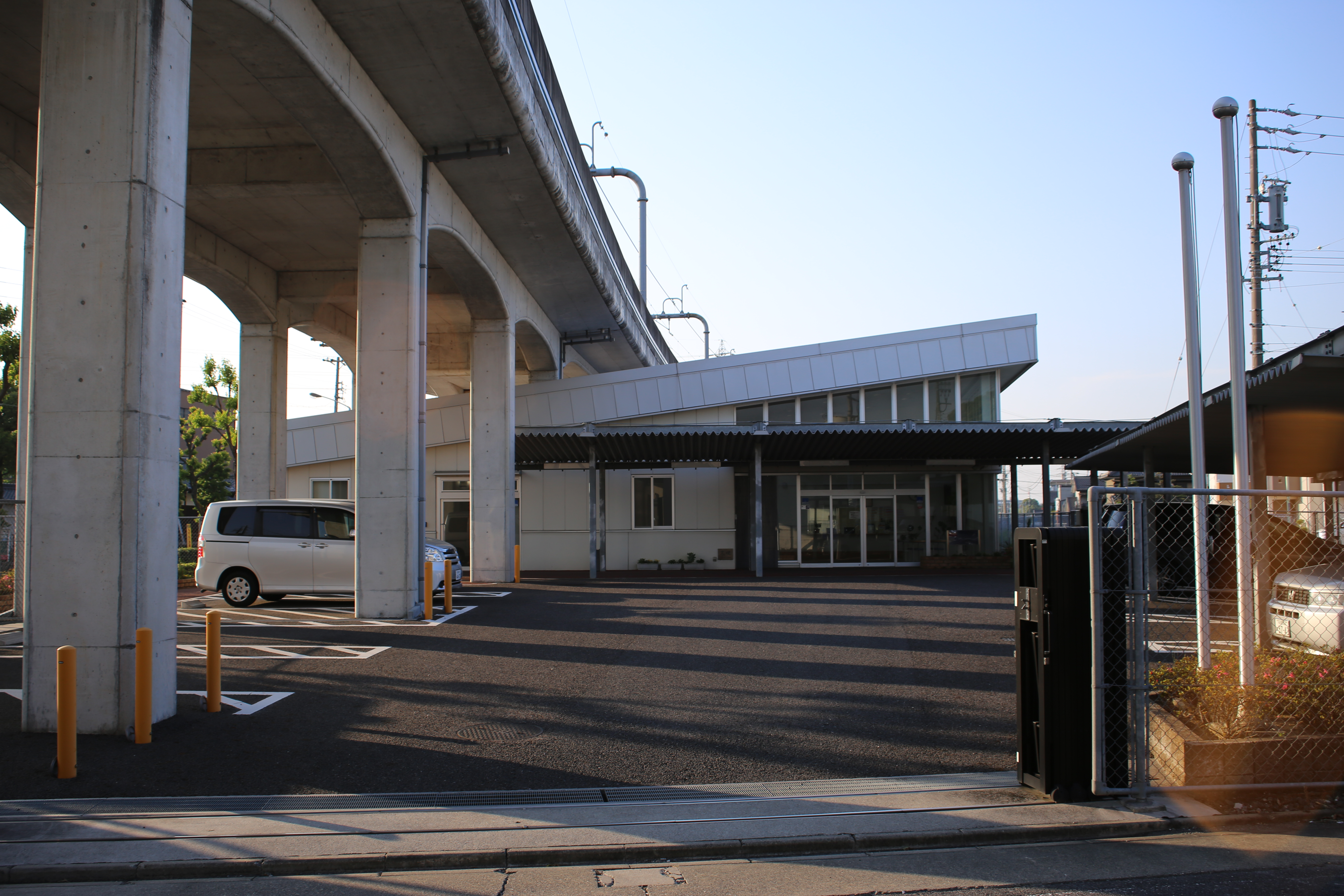 名古屋市港区正徳町のジェイアール東海ウェル本社を南側公道より撮影